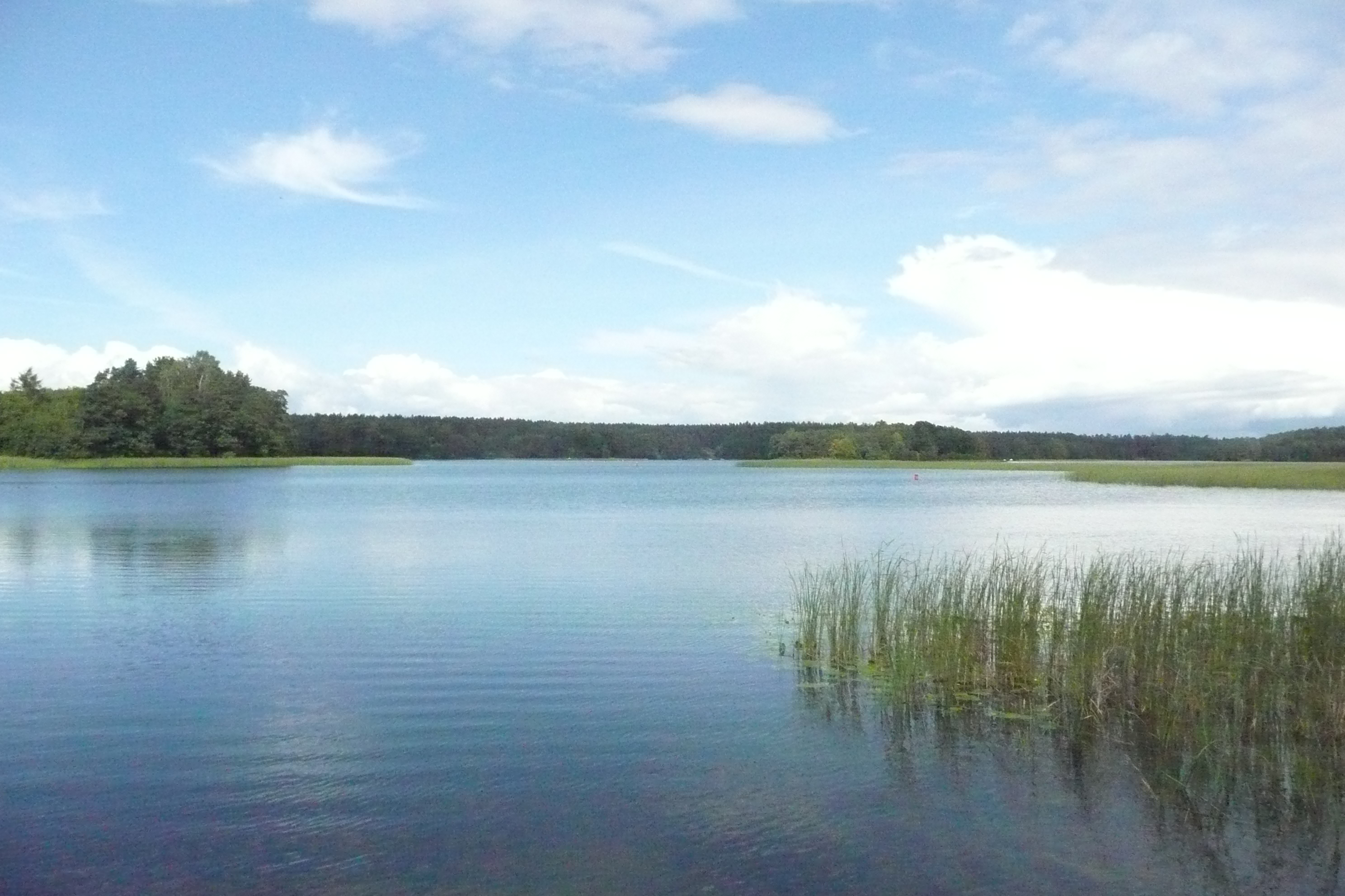 Jezioro Studzieniczne - widok z przystani